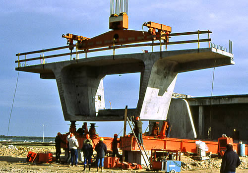 Un voussoir du pont de l'île de Ré Photo issue de ma banque d'images : Alain Pep.per 29 août 2006 à 21:53 (CEST)